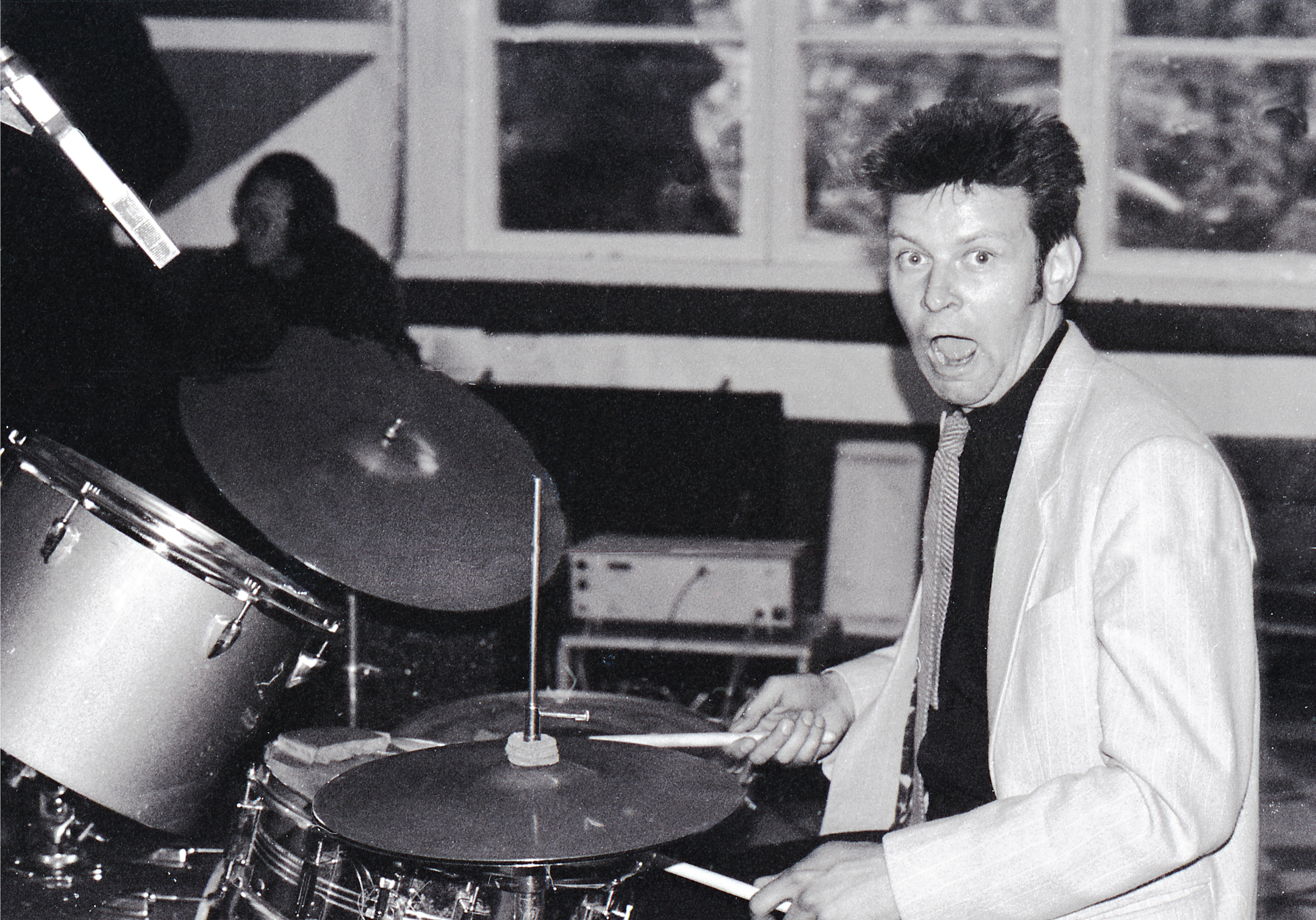 Harry Kõrvits